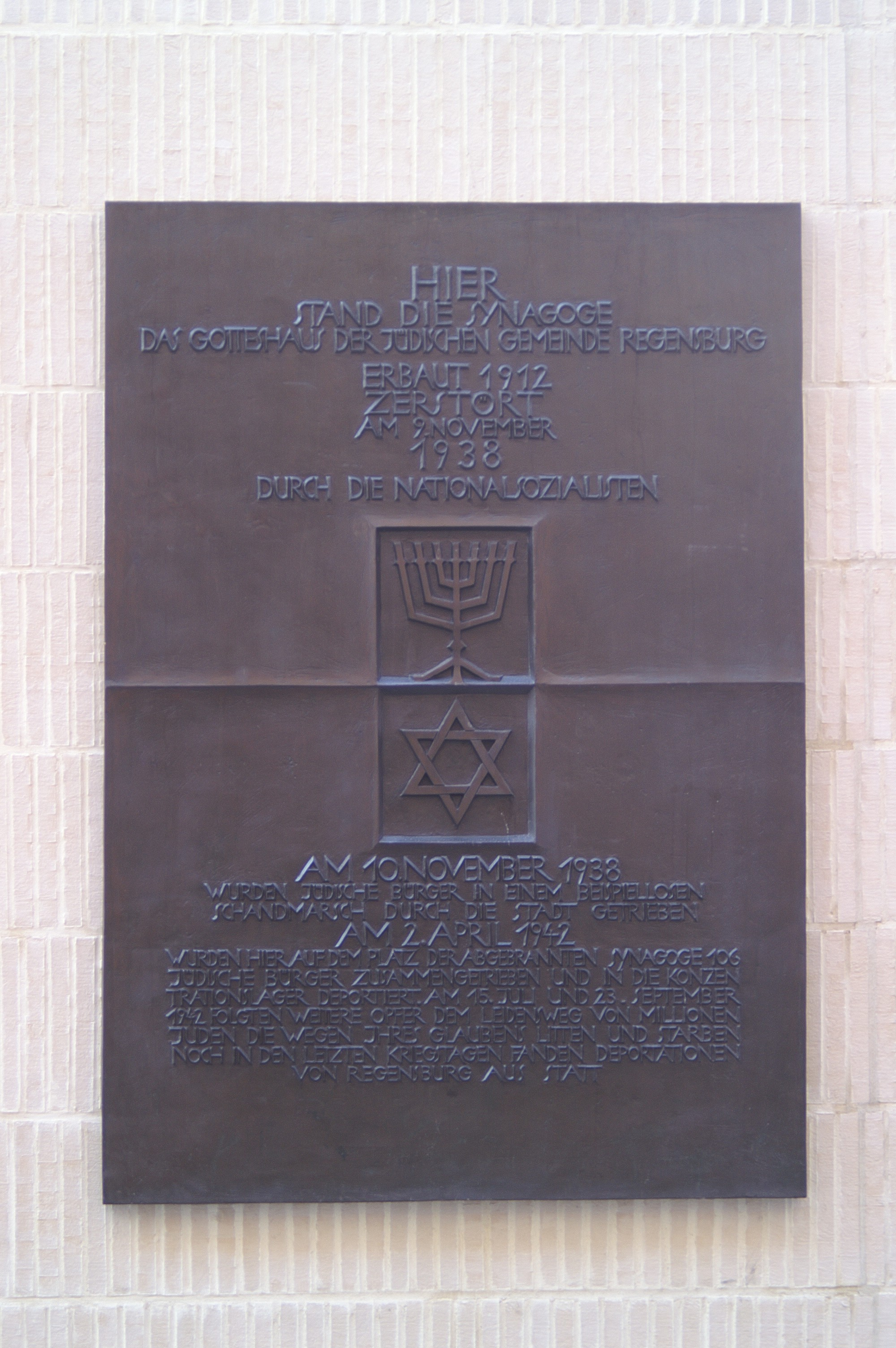 Jüdisches Gemeindezentrum Regensburg Gedenktafel